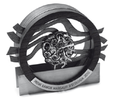 El guardó del Premi Ramon Margalef és una escultura que interpreta una microalga anomenada Picarola margalefii.